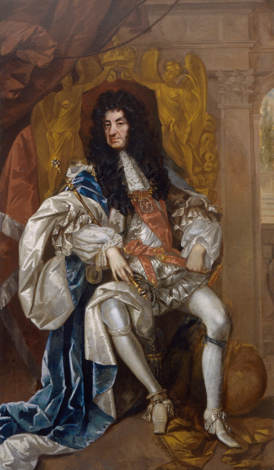 Karl II.